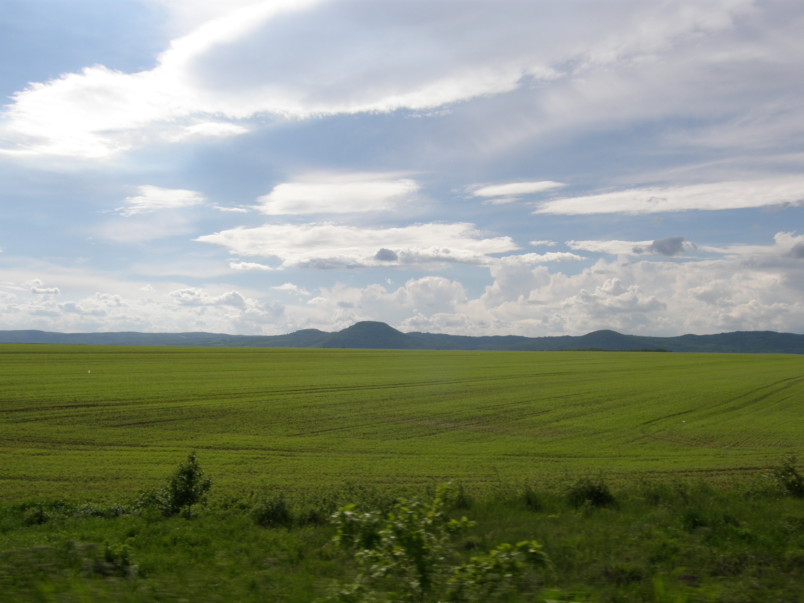 Пут између града КлаКладова и села Корбову / Put izmeću grada Kladova i sela Korbovu